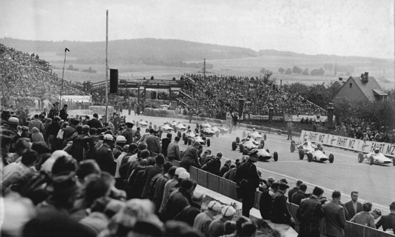 Zentralbild Kohls 23.8.1963 Sachsenring-Kurs veränderte sein Gesicht Als ein würdiger Gastgeber für die Besten des internationalen Motorennsports aus 22 Nationen erwies sich am Wochenende wiederum der im Süden der DDR bei Hohenstein-Ernstthal gelegene Sachsenring-Kurs. Im jahre 1949 wurde nach zehnjähriger Pause wieder an die große Tradition der Sachsenring-Rennen angeknüpft. Mit großzügiger Unterstützung der Arbeiter- und Bauernmacht wurde der Kurs weiter ausgebaut. Allein 1961 wurden zehntausende DM zur Verbesserung der Stecke verwandt. So erhielten damals zwei Drittel des Kurses einen neuen Rauhbelag, der hitzebeständiger und ebenflächiger ist. Auch die Kurve am Queckenberg bei Start und Ziel wurde begradigt und um drei Meter verbreitert. Durch die umfangreichen Bauarbeiten ist der Sachsenring-Kurs nicht nur sicherer, sondern auch erheblich schneller geworden. Die populäre Motorsportveranstaltung auf den Sachsenring fördert wie kaum ein anderes internationales Rennen die freundschaftlichen Beziehungen untereinander, nicht zuletzt auch deshalb, weil es hier keinerlei Diskriminierung gibt und alle Motorsportler, ganz gleich aus welchem Land sie kommen, herzlich willkommen sind. UBz: Start der Formel-Junior Rennwagen.